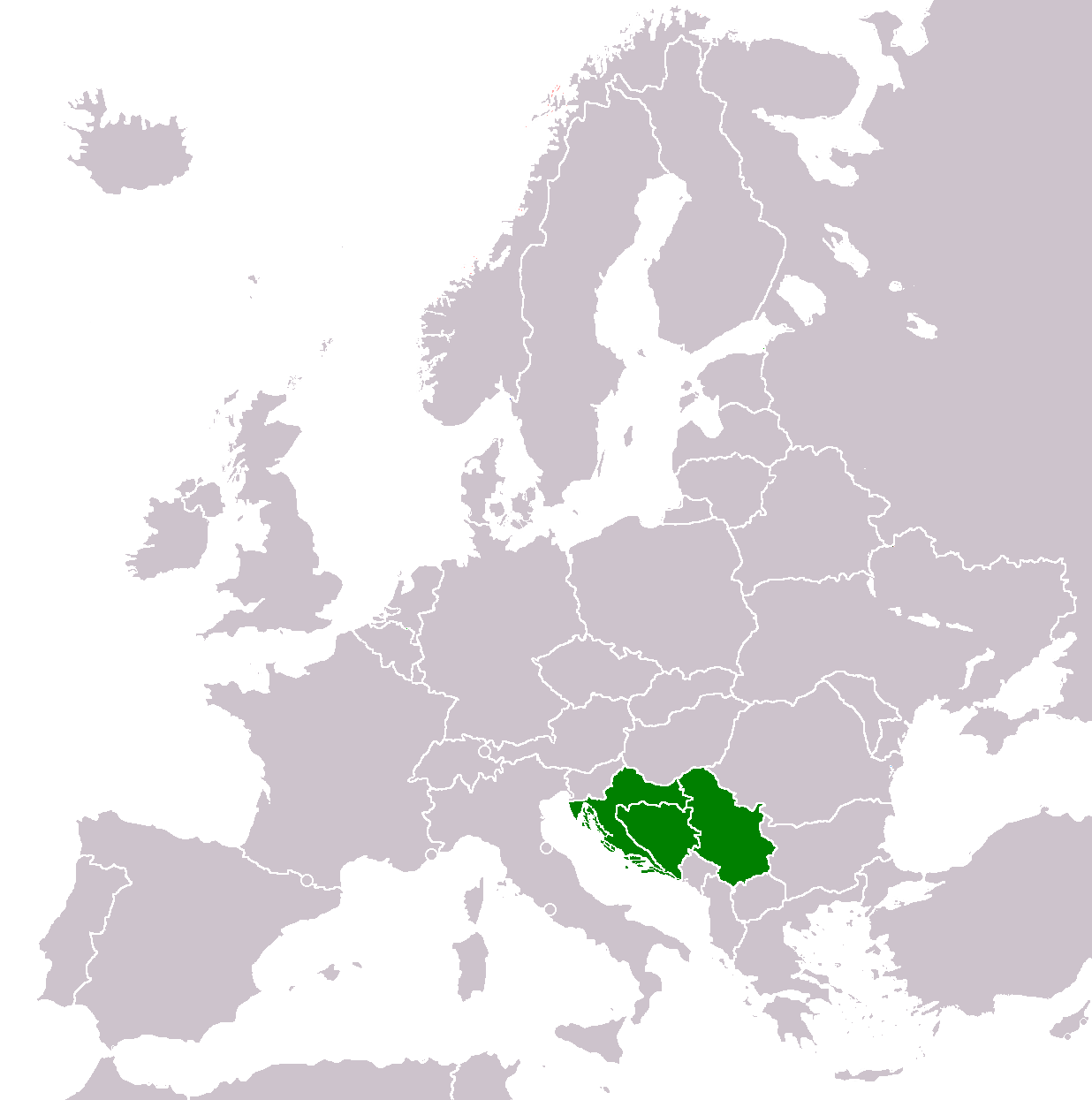 Konzum in Europe